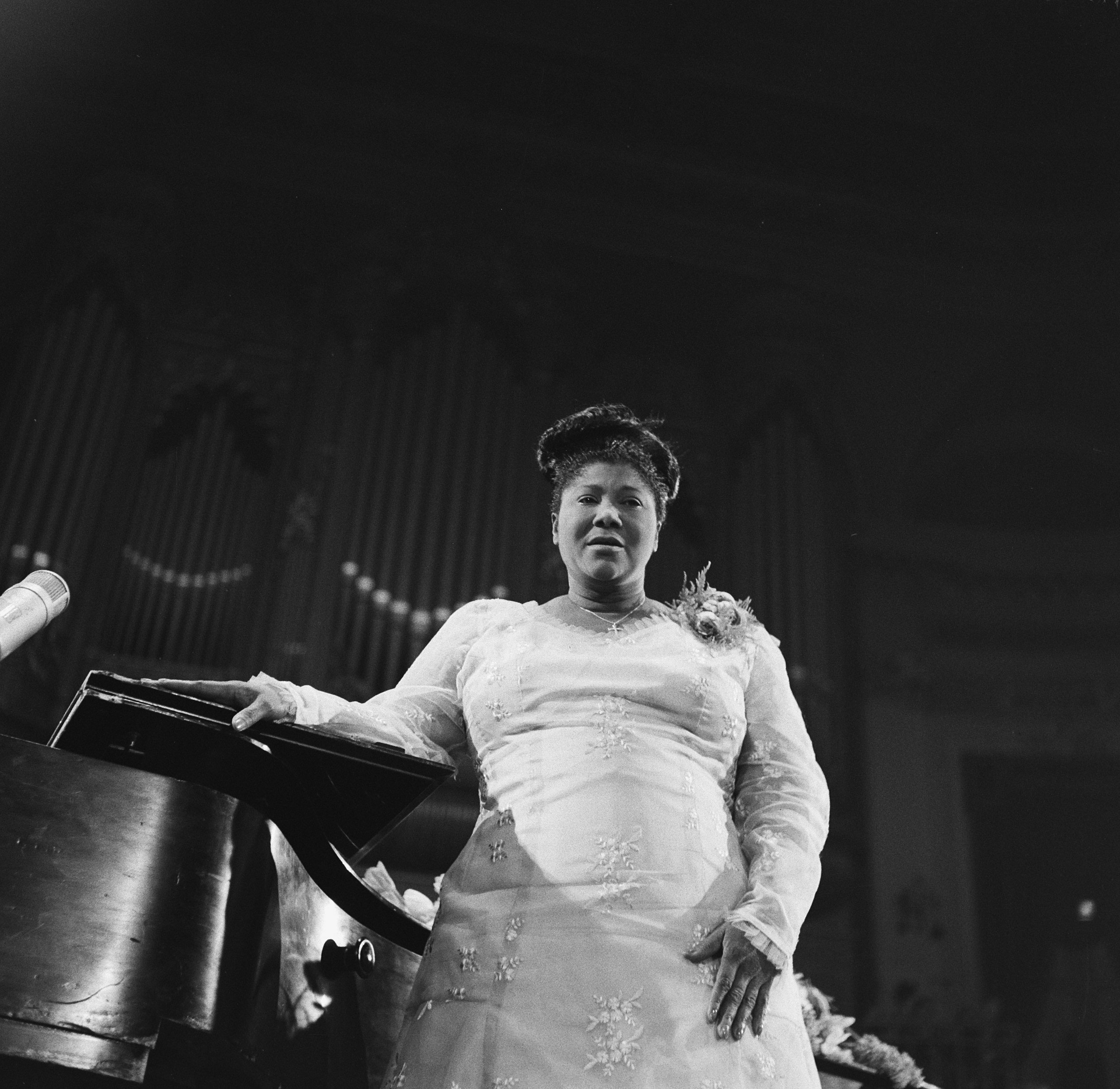 Collectie / Archief : Fotocollectie Anefo Reportage / Serie : [ onbekend ] Beschrijving : Optreden van Mahalia Jackson in Concertgebouw Datum : 23 april 1961 Locatie : Amsterdam, Noord-Holland Trefwoorden : concerten, gospels, jazz, muziek, zangeressen Persoonsnaam : Jackson Mahalia Instellingsnaam : Concertgebouw Fotograaf : Brinkman, Dave / Anefo Auteursrechthebbende : Nationaal Archief Materiaalsoort : Negatief (zwart/wit) Nummer archiefinventaris : bekijk toegang 2.24.01.03 Bestanddeelnummer : 912-3937